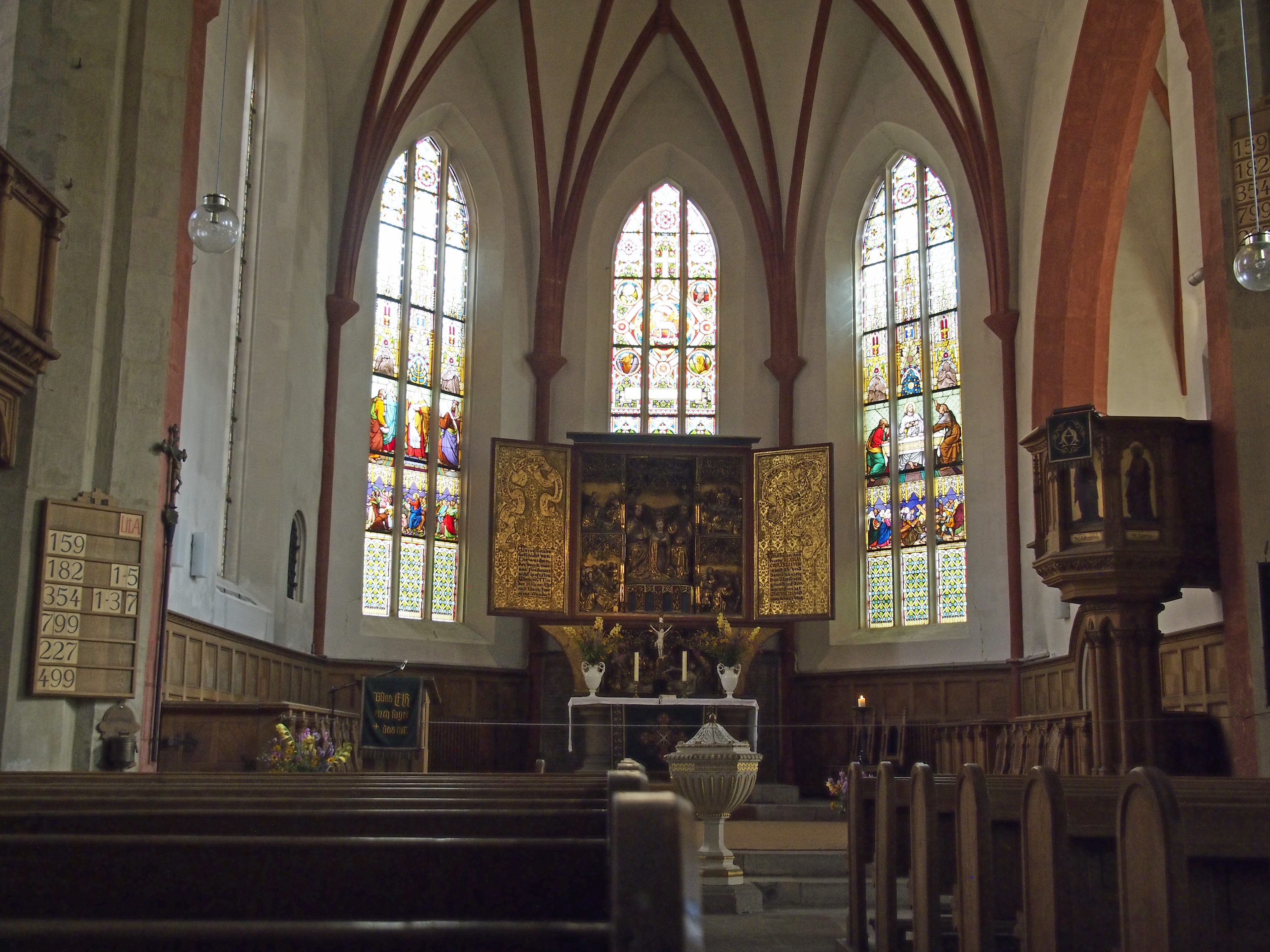 Innenraum mit Altar der Frauenkirche in Meißen